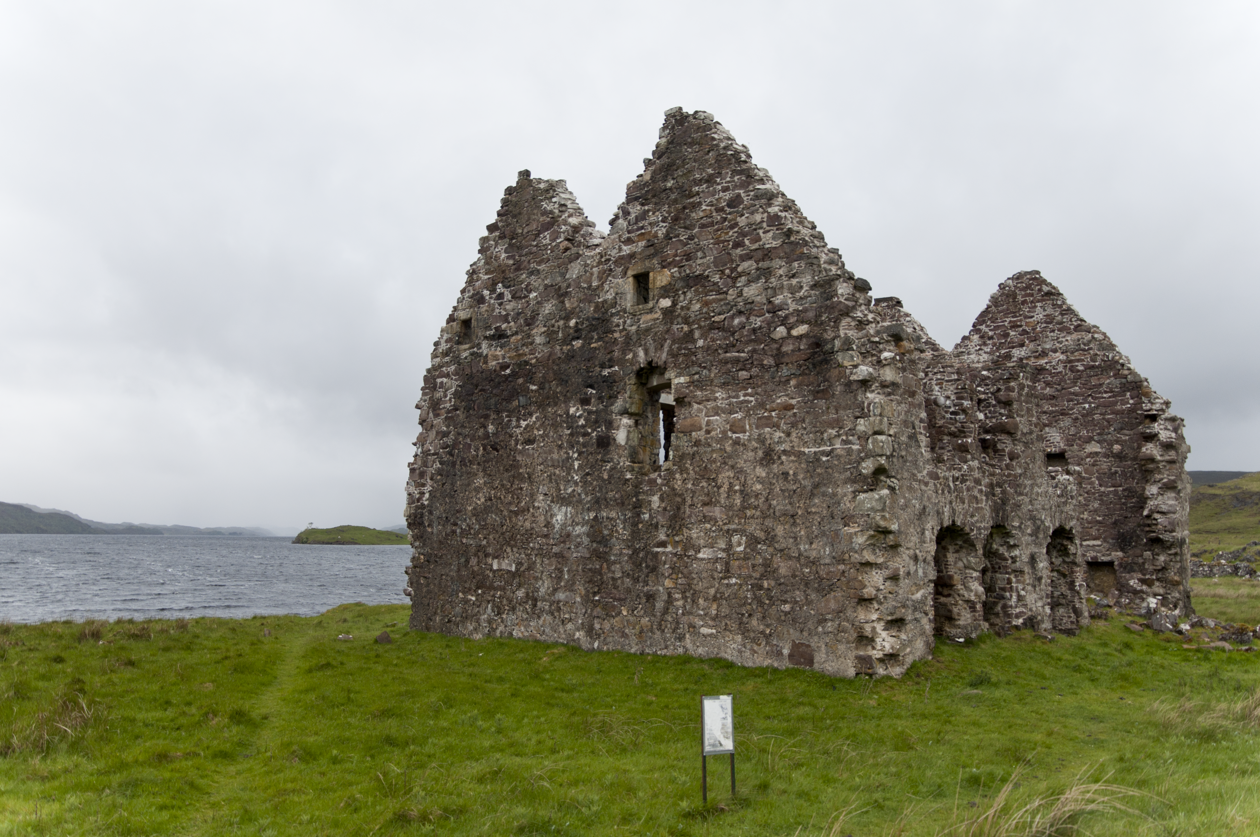 Calda House, Sutherland, Schotland